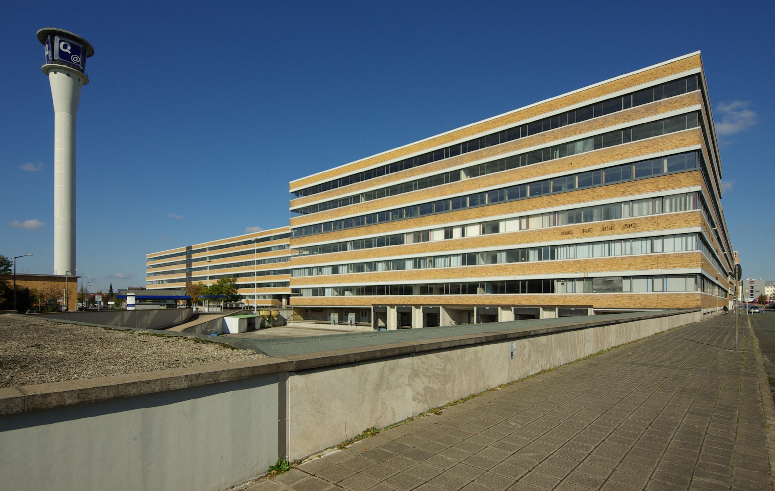 Großversandhaus der ehemaligen Quelle GmbH im Nürnberger Stadtteil Eberhardshof. Links der Quelleturm.